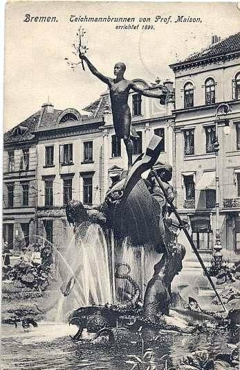 Teichmannbrunnen in Bremen von Rudolf Maison (1854-1904)